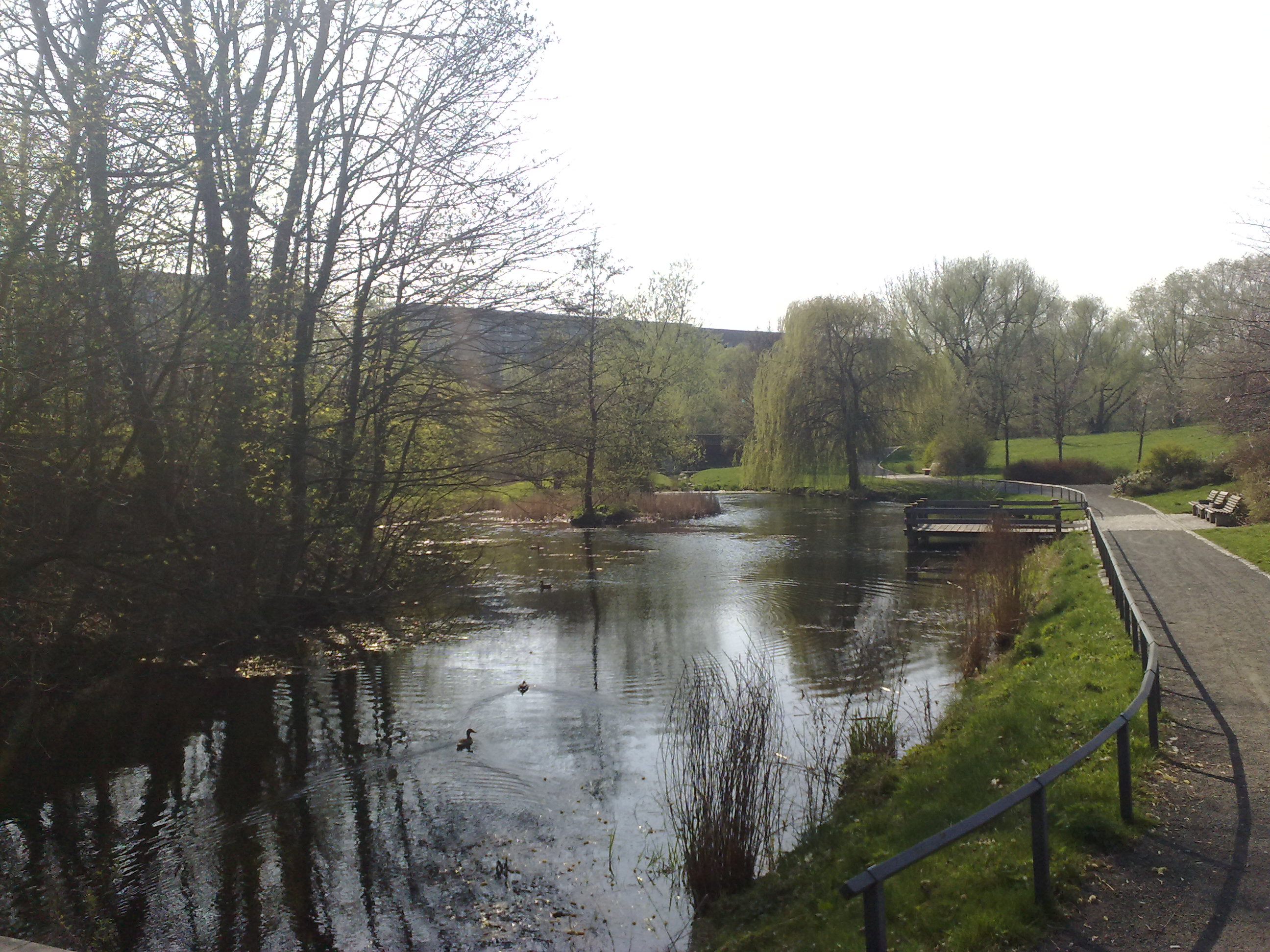 Park in der Nähe der Heiligen Grab Straße